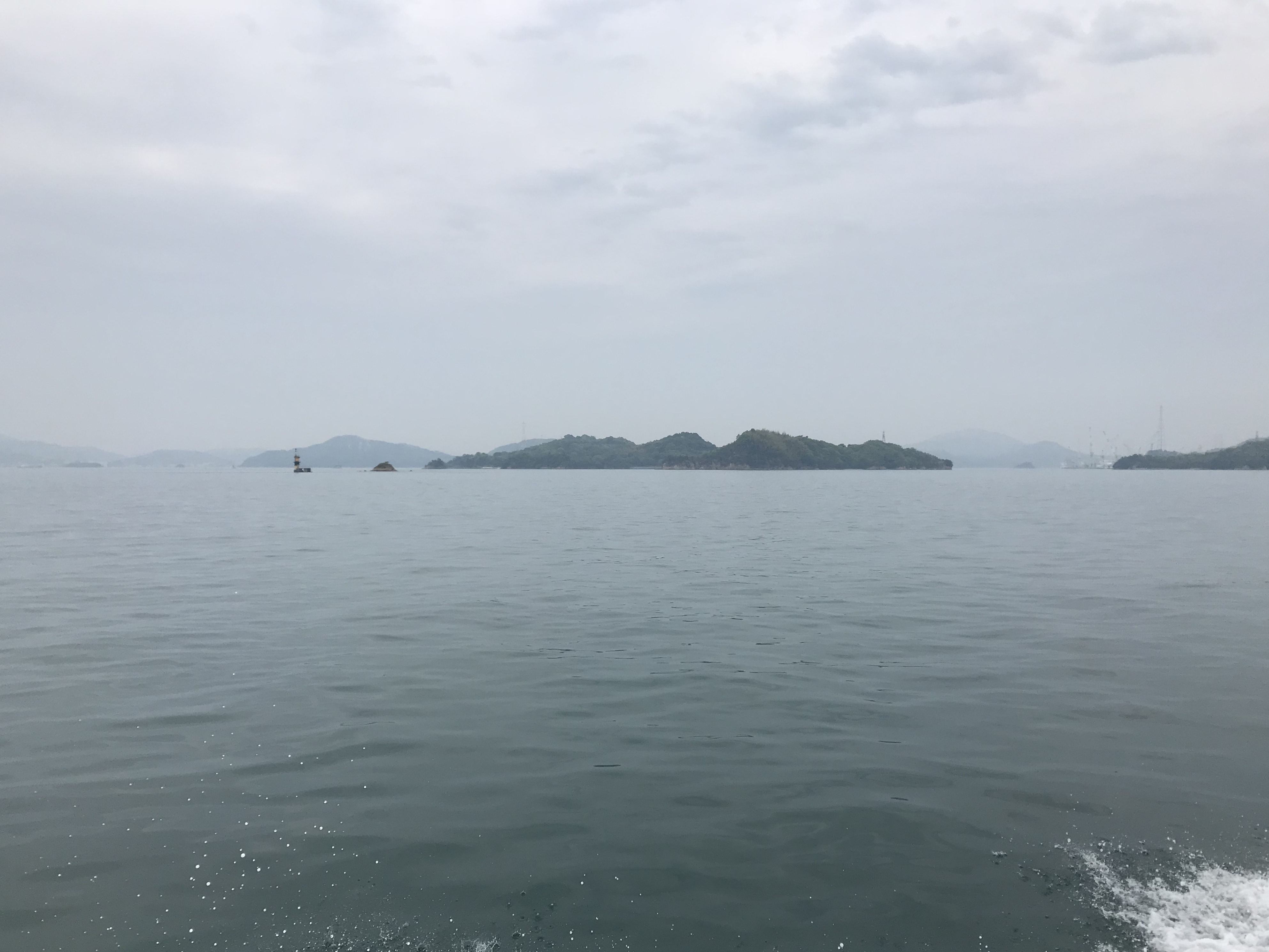 土生港行きの高速船より望む細島